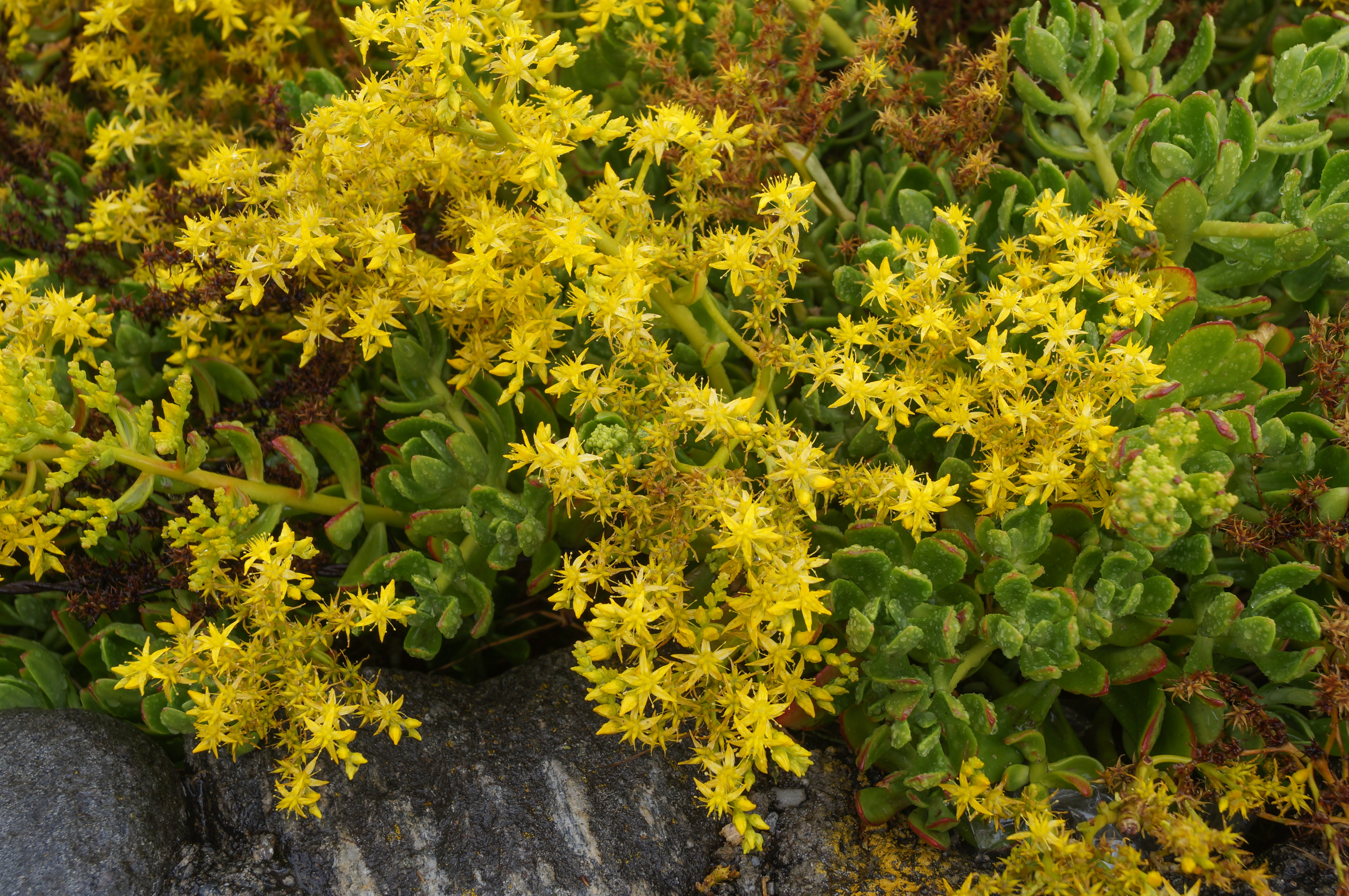 Sedum